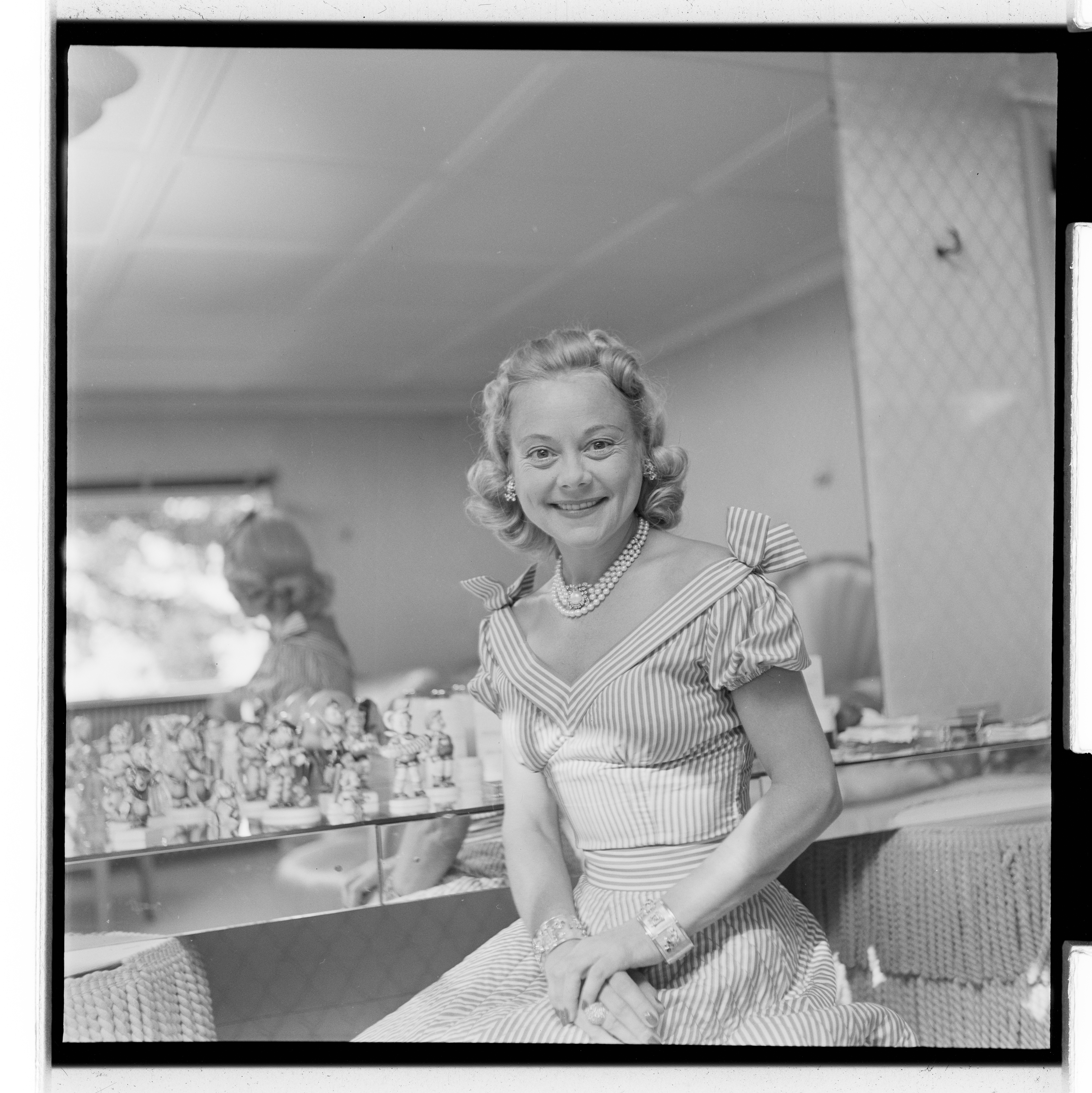 Bildet er hentet fra Arkivverket. Sonja Henie. NÅ nr. 21, 1953 Arkivinstitusjon : Riksarkivet Arkivnavn : Billedbladet NÅ Sted : Norge, Ukjent, Ukjent, Emneord: Kunstløpere Avbildet